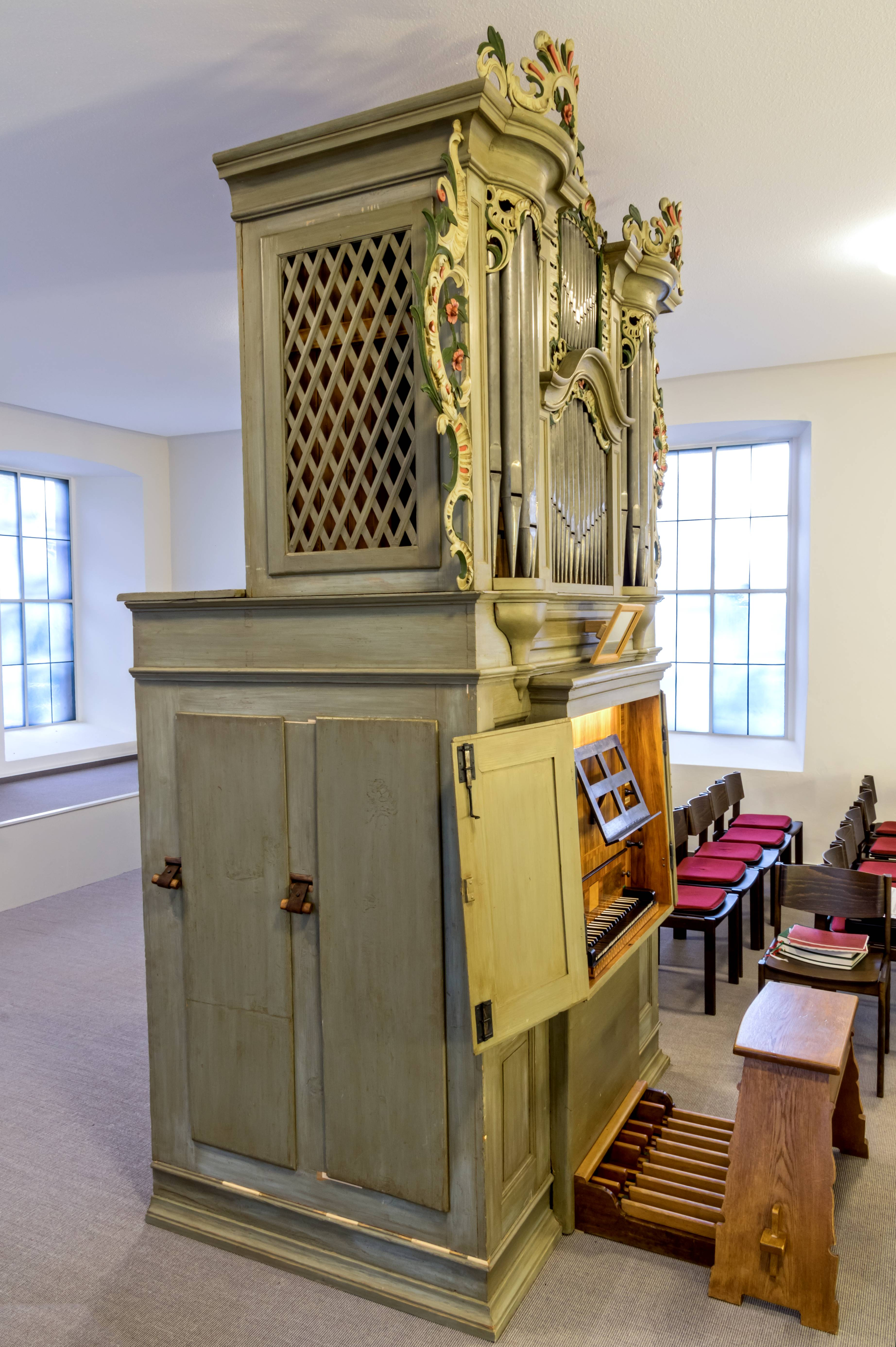 Bilder aus der evangelischen Kirche in Hertingen Die Orgel aus dem Jahre 1787 von Blasius Bernauer Gesamtansicht